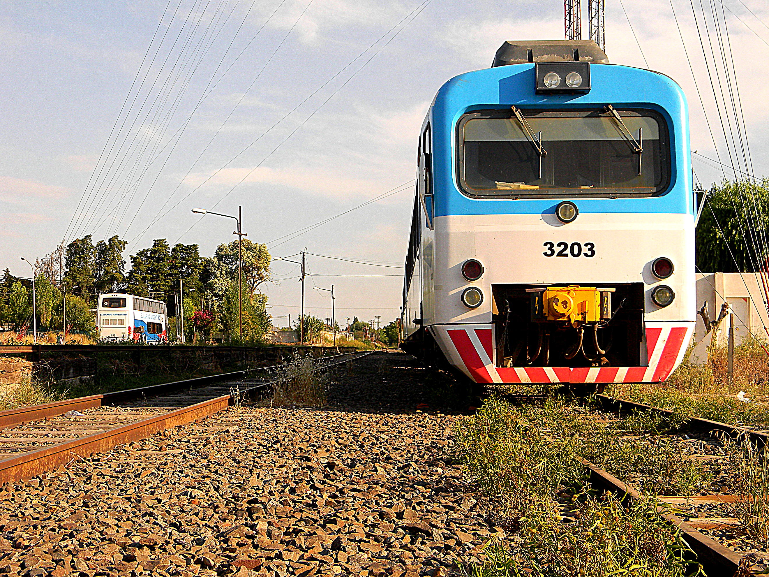 DSCN1622rr